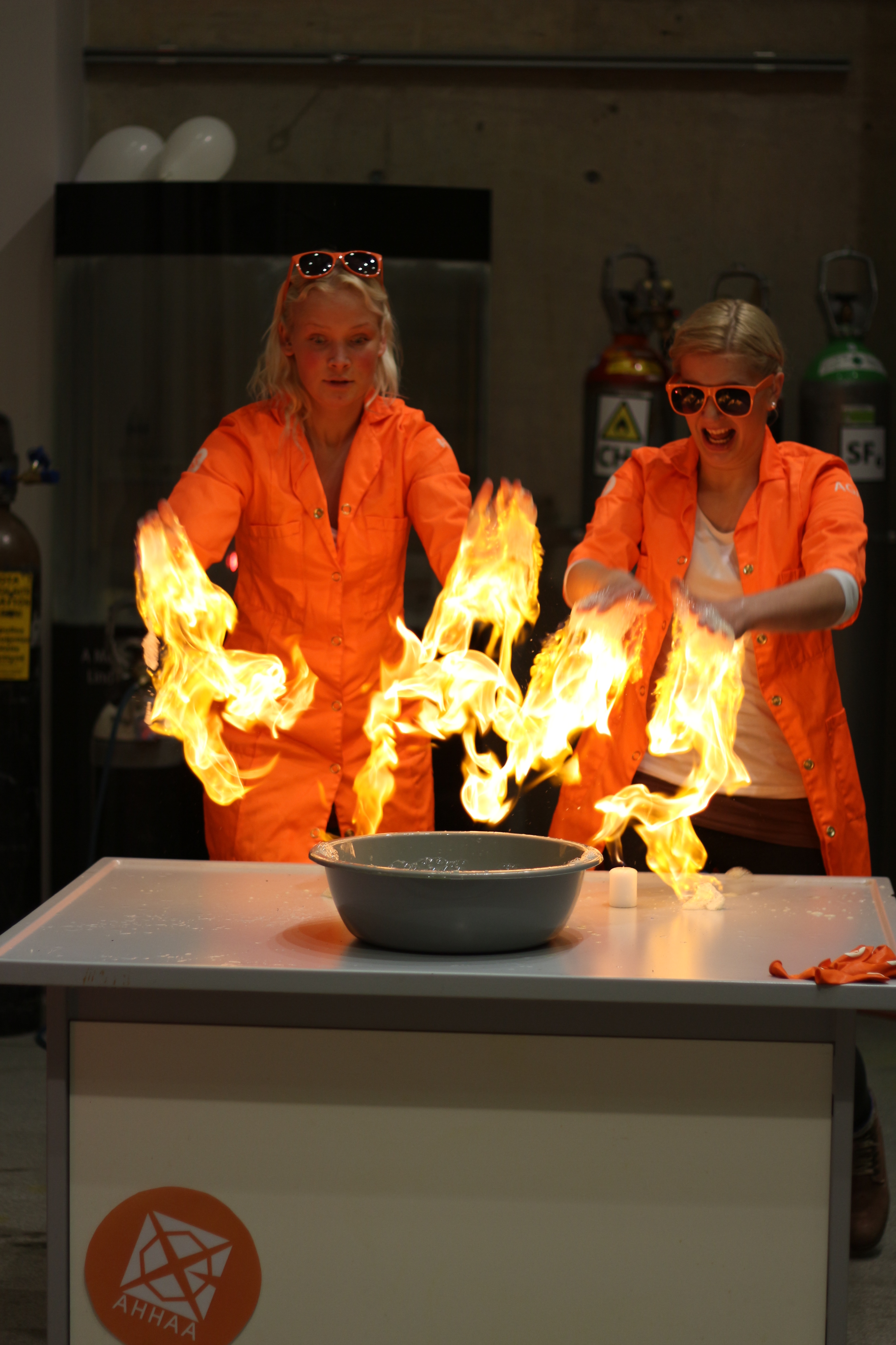 Teadusteater